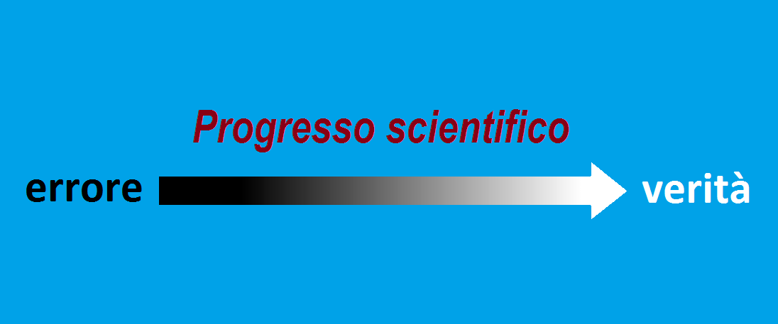 Eliminando progressivamente l'errore, la scienza tende alla verità